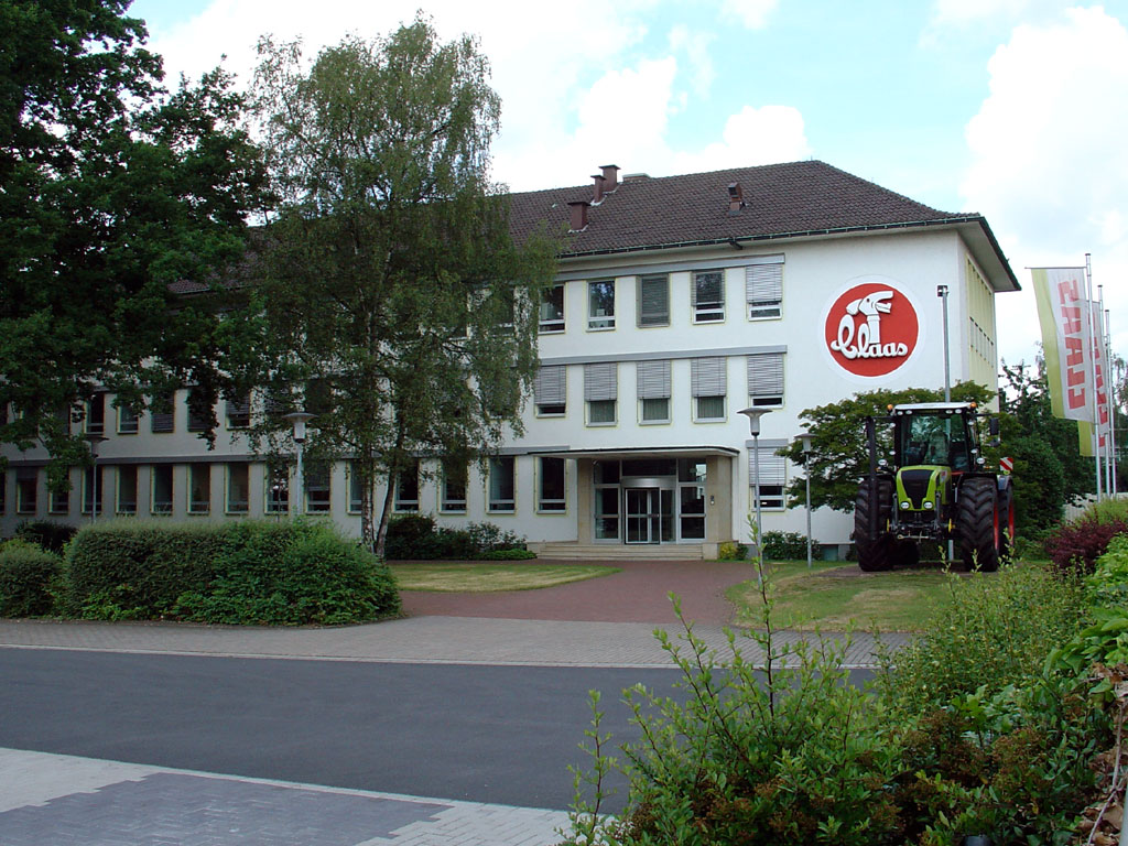 Haupteingang der Fa. Claas, Standort Harsewinkel; rechts im Bild ein Claas Xerion